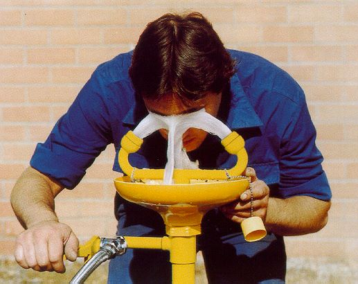 Fest an das Trinwassernetz angeschlossene Augendusche